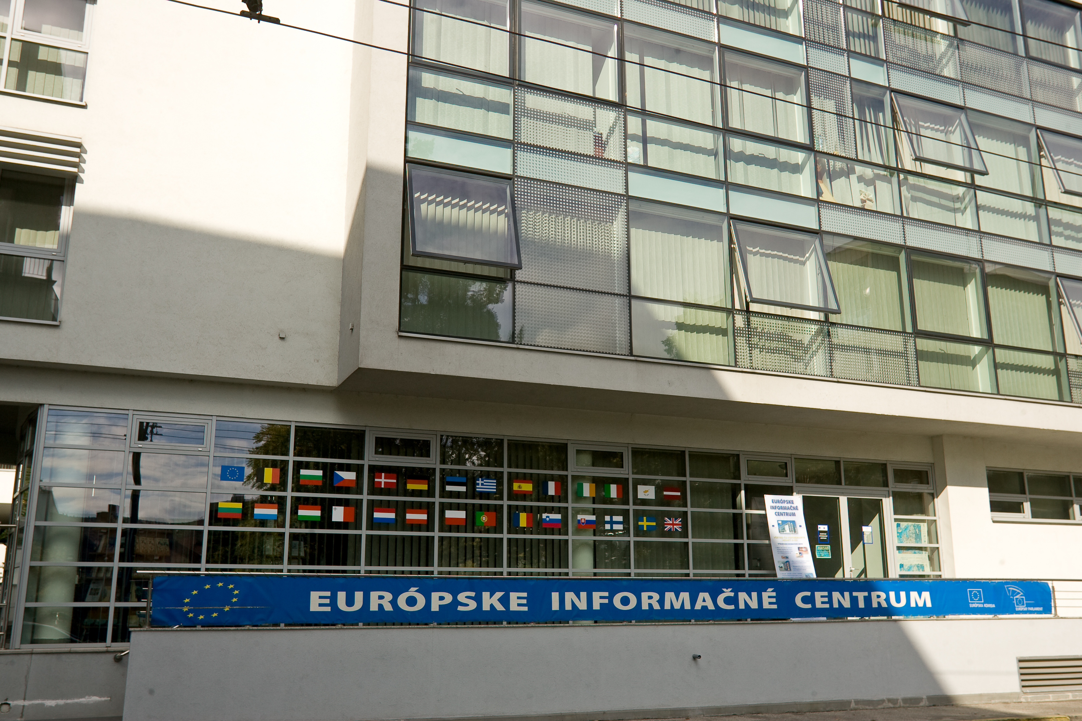 Dom EÚ v Bratislave, foto: EK